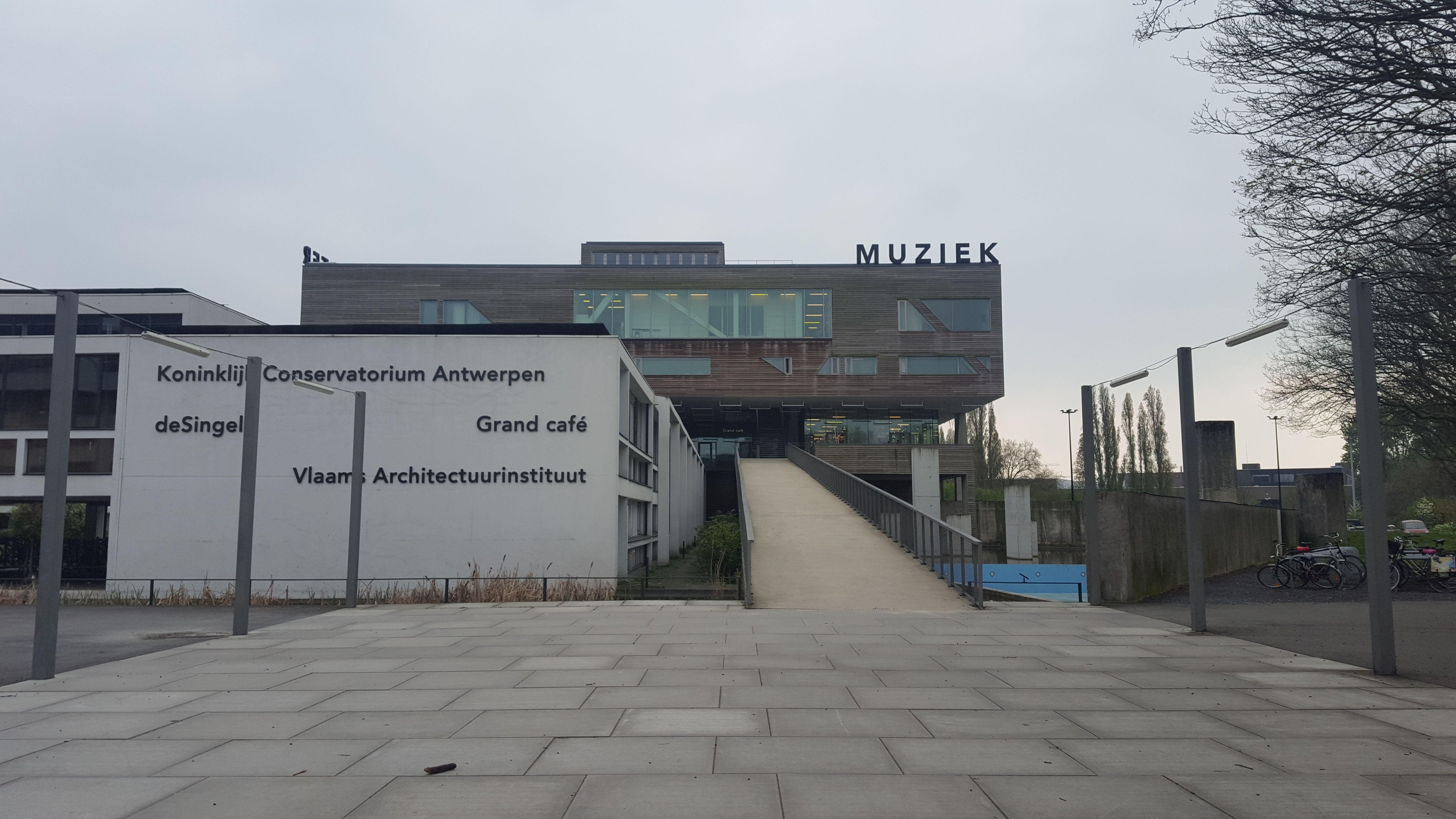 deSingel, Antwerpen, België